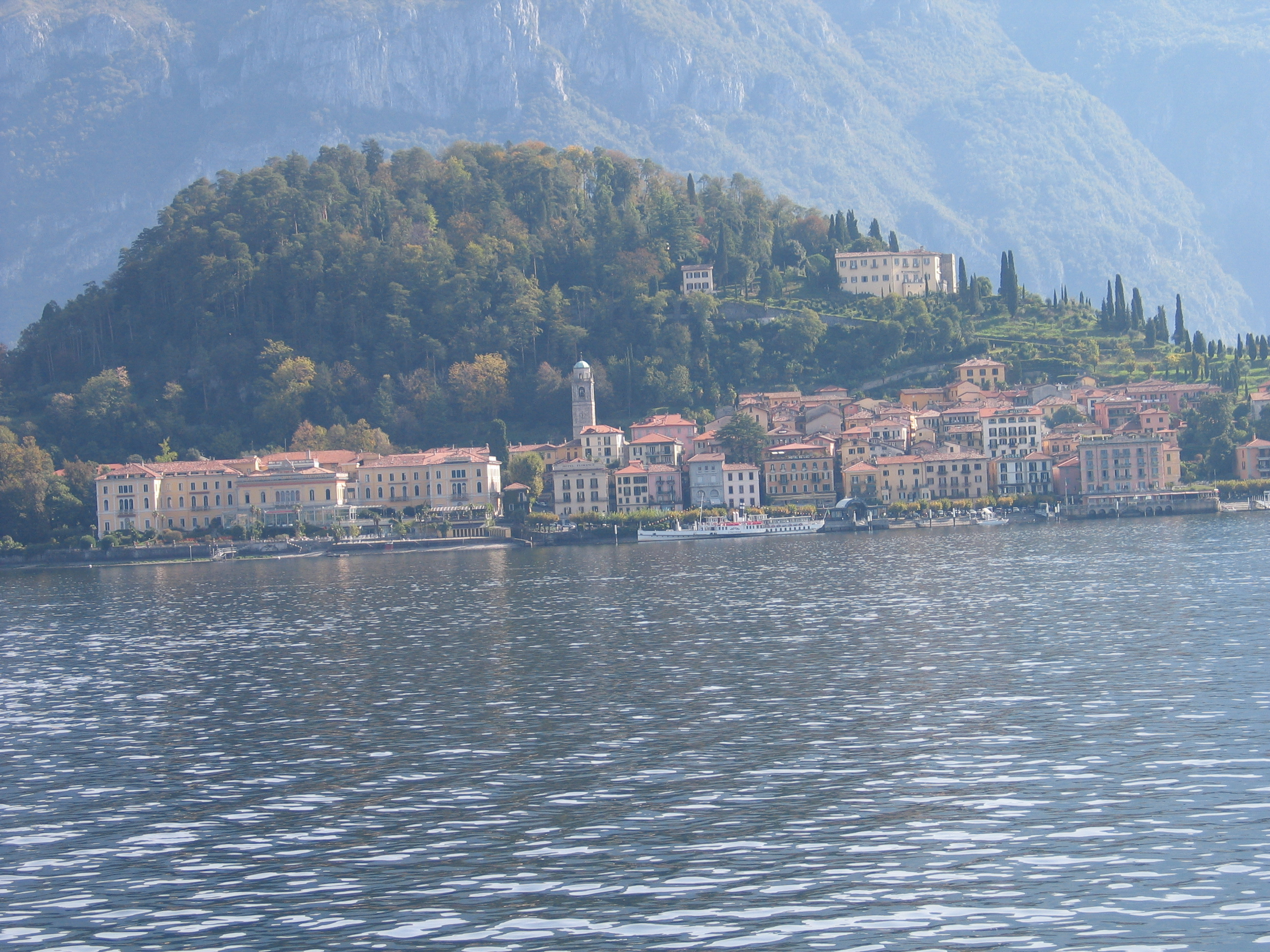 Bellagio vom Wasser aus